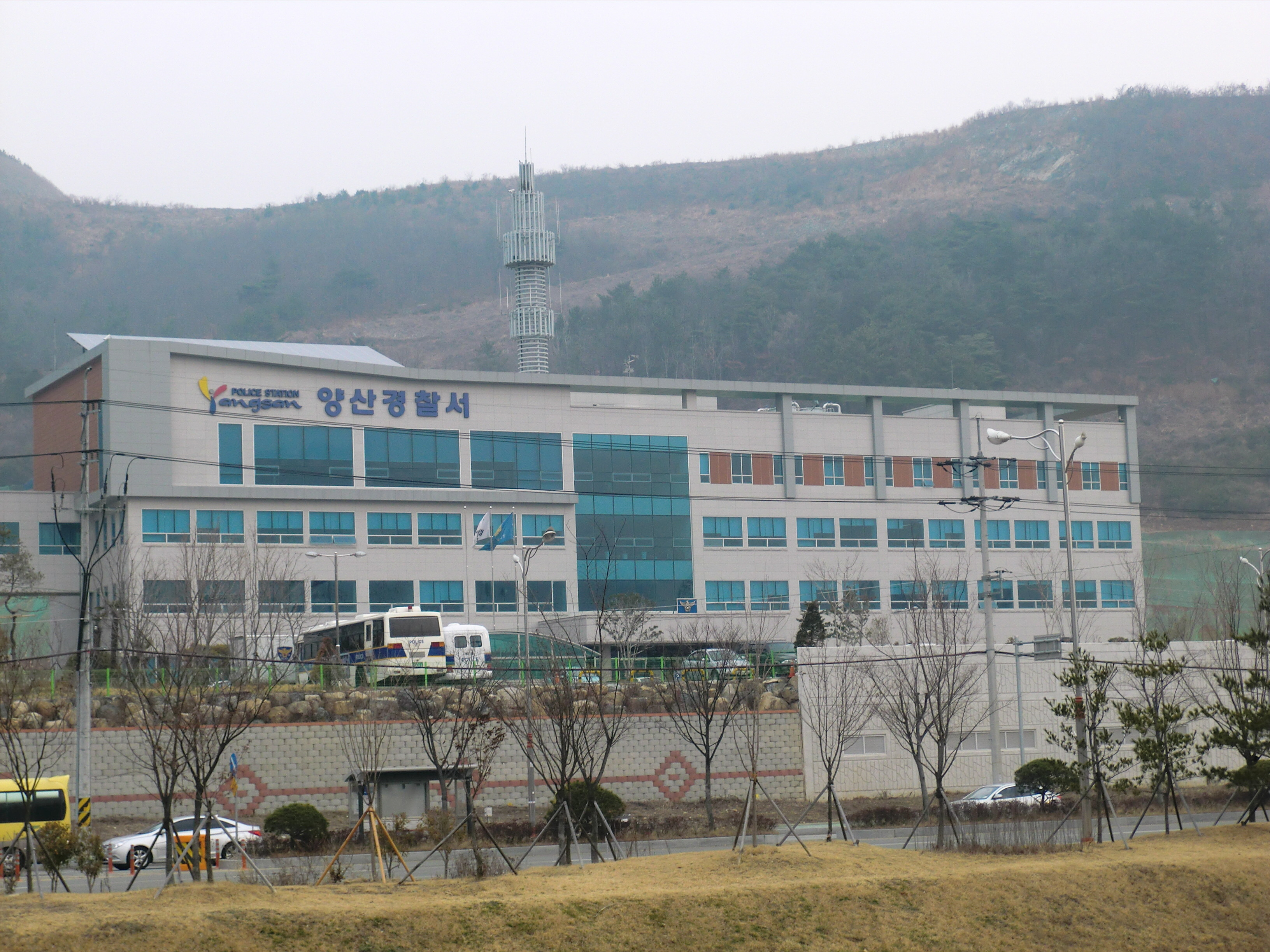 경상남도 양산시에 있는 양산경찰서